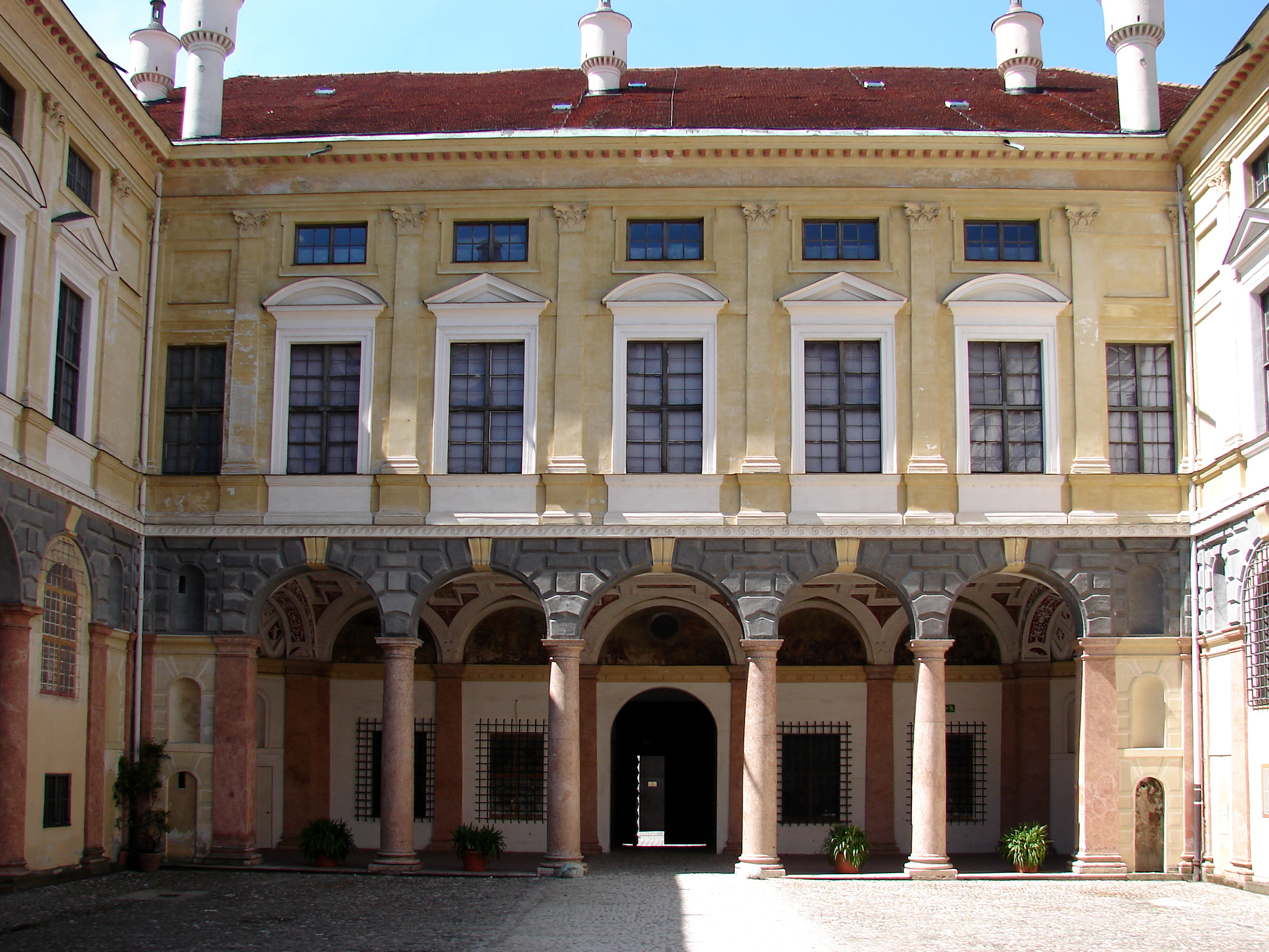 Die Stadtresidenz Landshut gilt als früheste, sich auf italienische Vorbilder beziehende Renaissancearchitektur nördlich der Alpen. Sie wurde unter Herzog Ludwig X. in den Jahren 1536 bis 1543 erbaut.